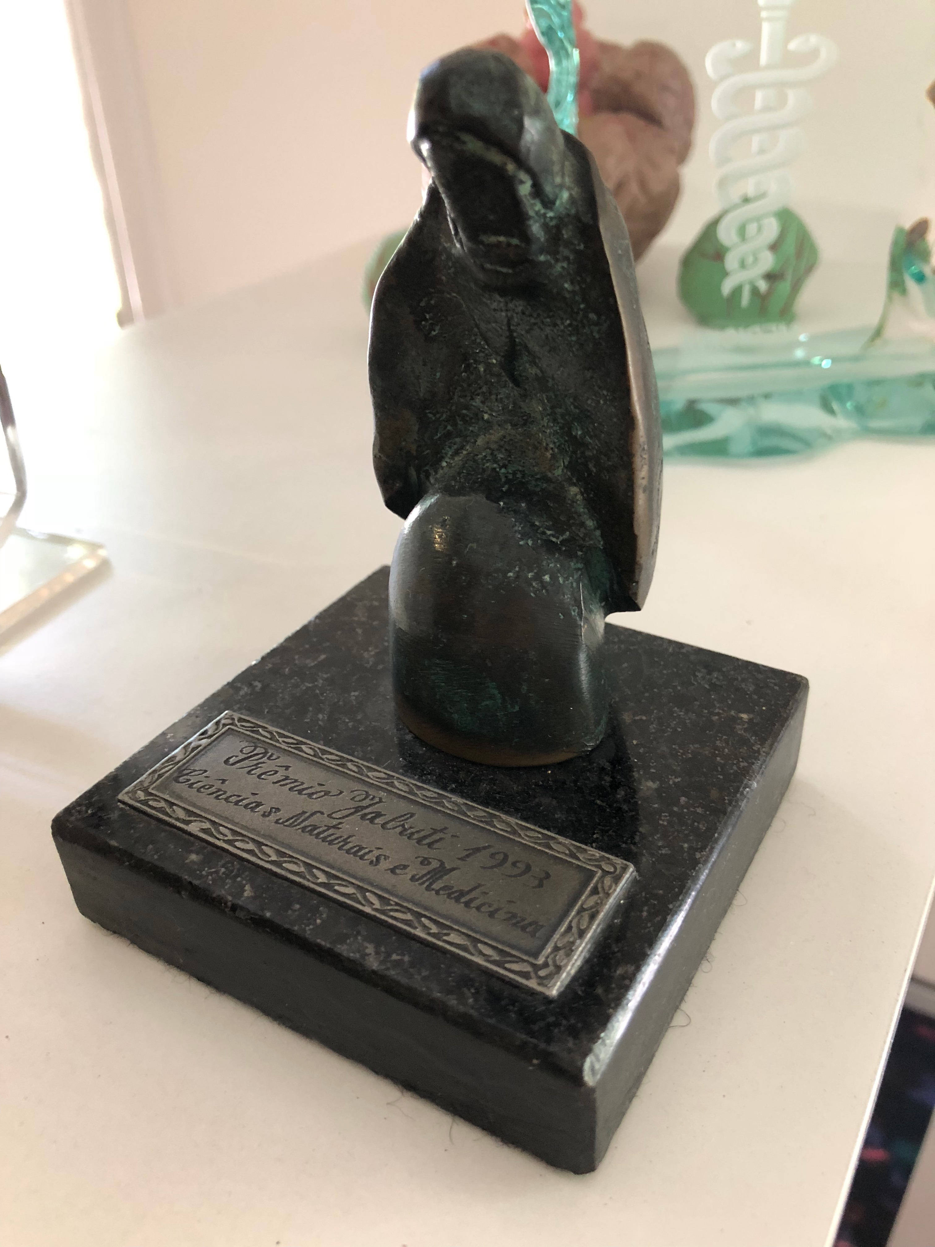 premio jabuti 1993